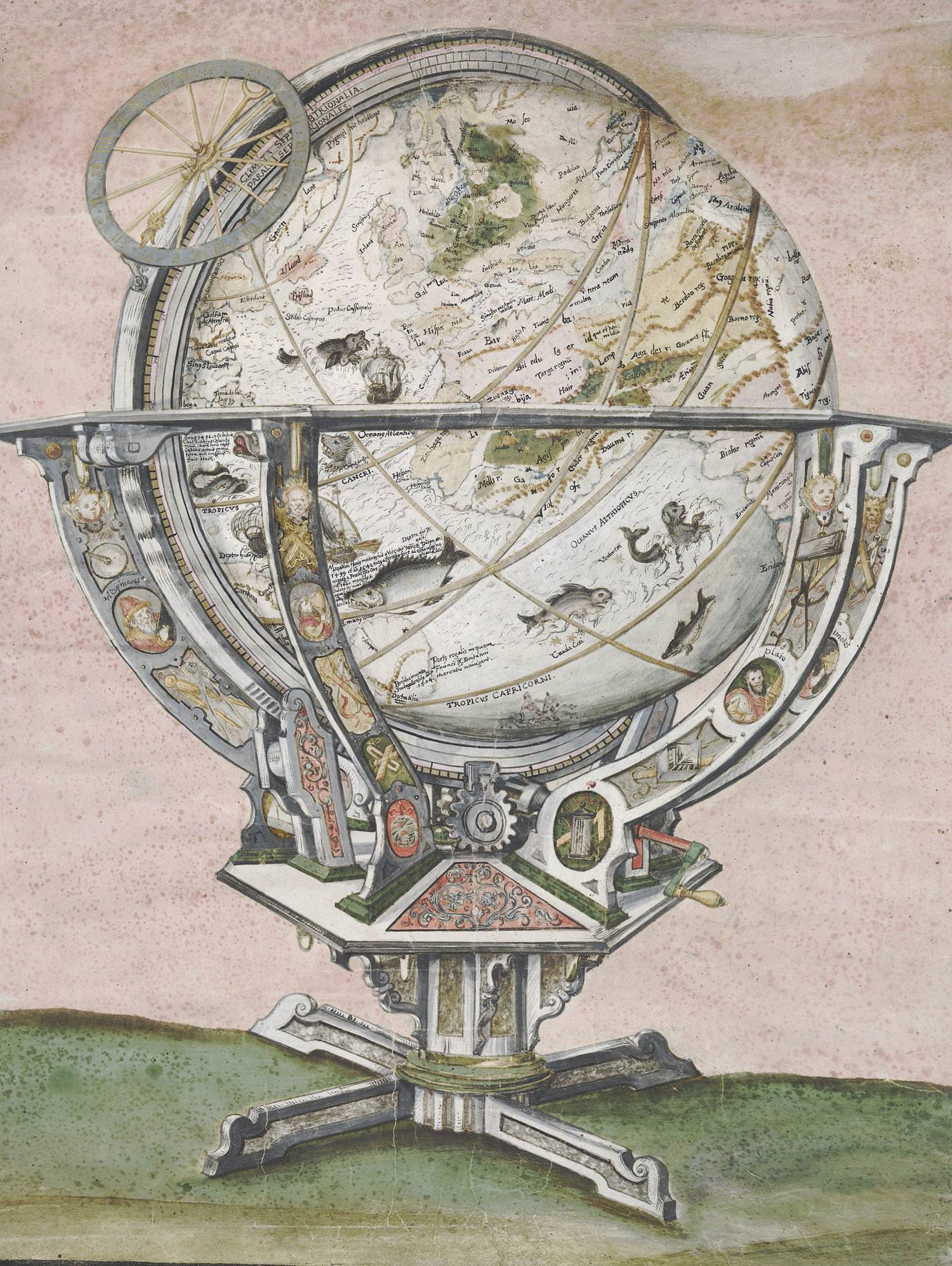 St. Galler Globus, vor 1595; Malerei auf Pergament; 59 x 44 cm, Zentralbibliothek Zürich, WaK R 25